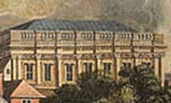 'Casa de los Banquetes' o 'Banqueting House', vista de un recorte de la pintura al óleo del artista Hendrick Danckerts (1645–1679). // Recorte parcial de la imagen indicada en File:The Old Palace of Whitehall by Hendrik Danckerts.jpg, y en donde se reproduce una vista de una pintura al óleo, la que representa una parte del enorme y antiguo Palacio de Whitehall, el que fuera casi completamente destruido por un incendio en el año 1698 (a excepción precisamente del 'Banqueting House').